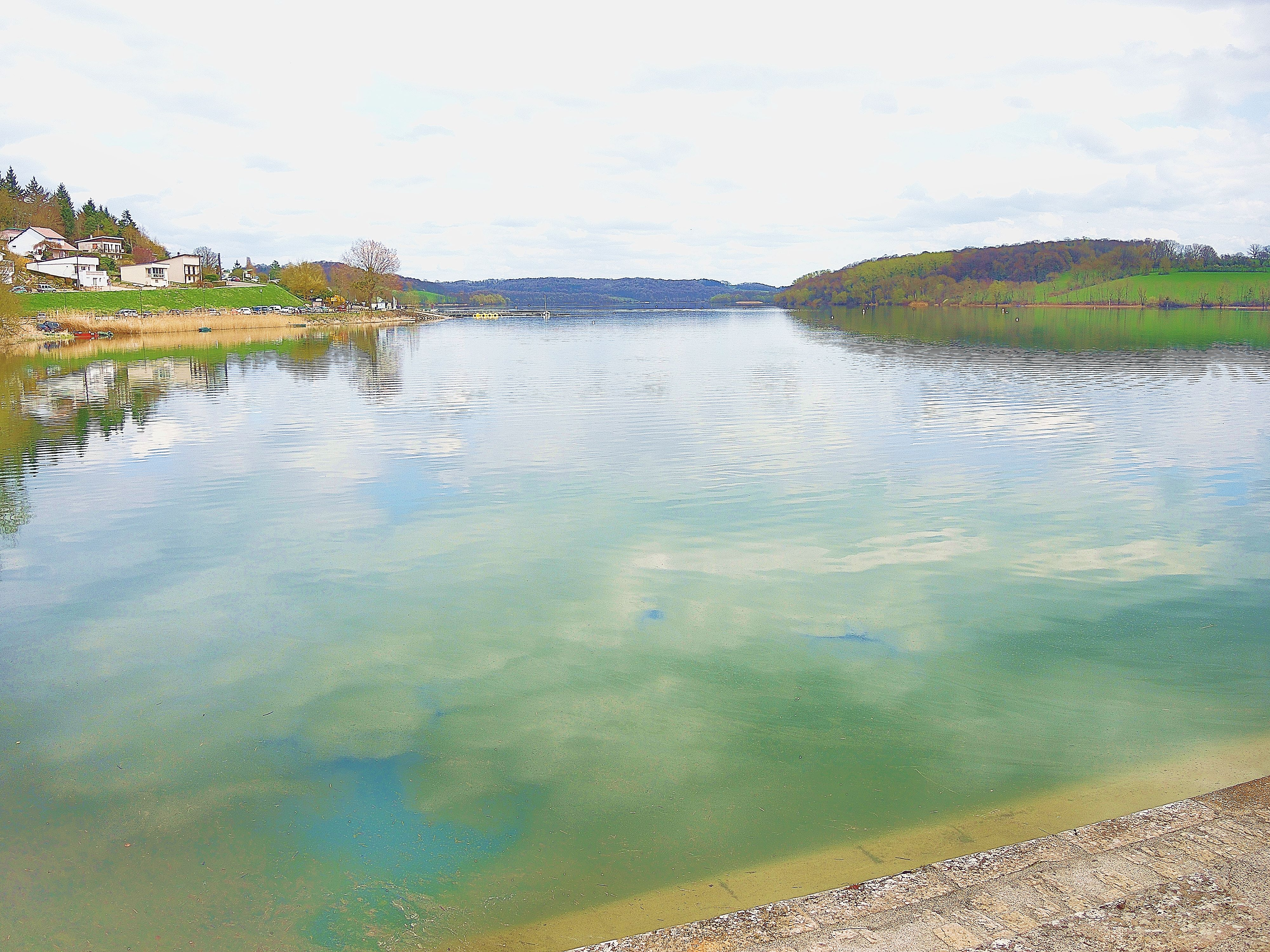 Lac de la Liez, vu de la digue du barrage.